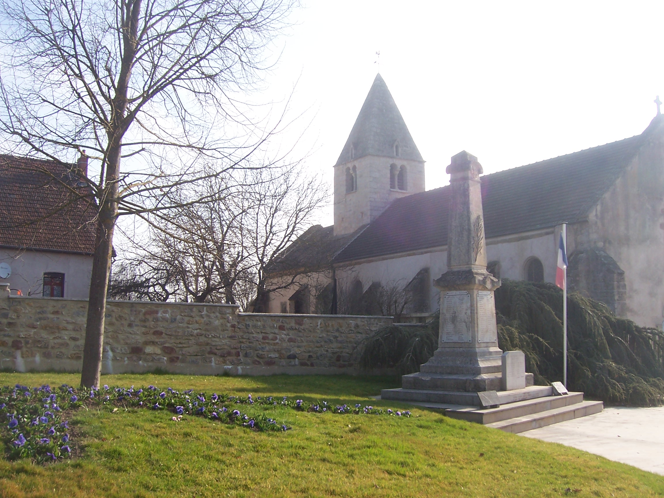 Eglise du Breuil